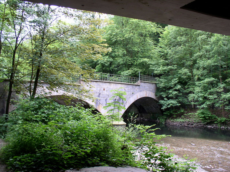 Die Napoleonsbrücke zwischen Remscheid und Solingen